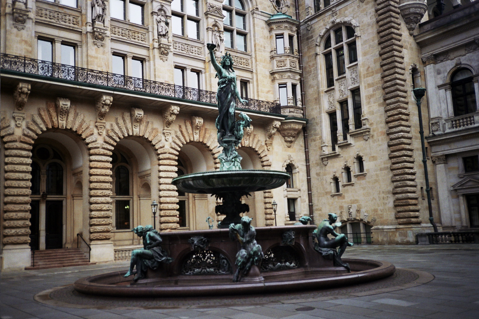 Fontein op de binnenplaats van het Hamburger Rathaus